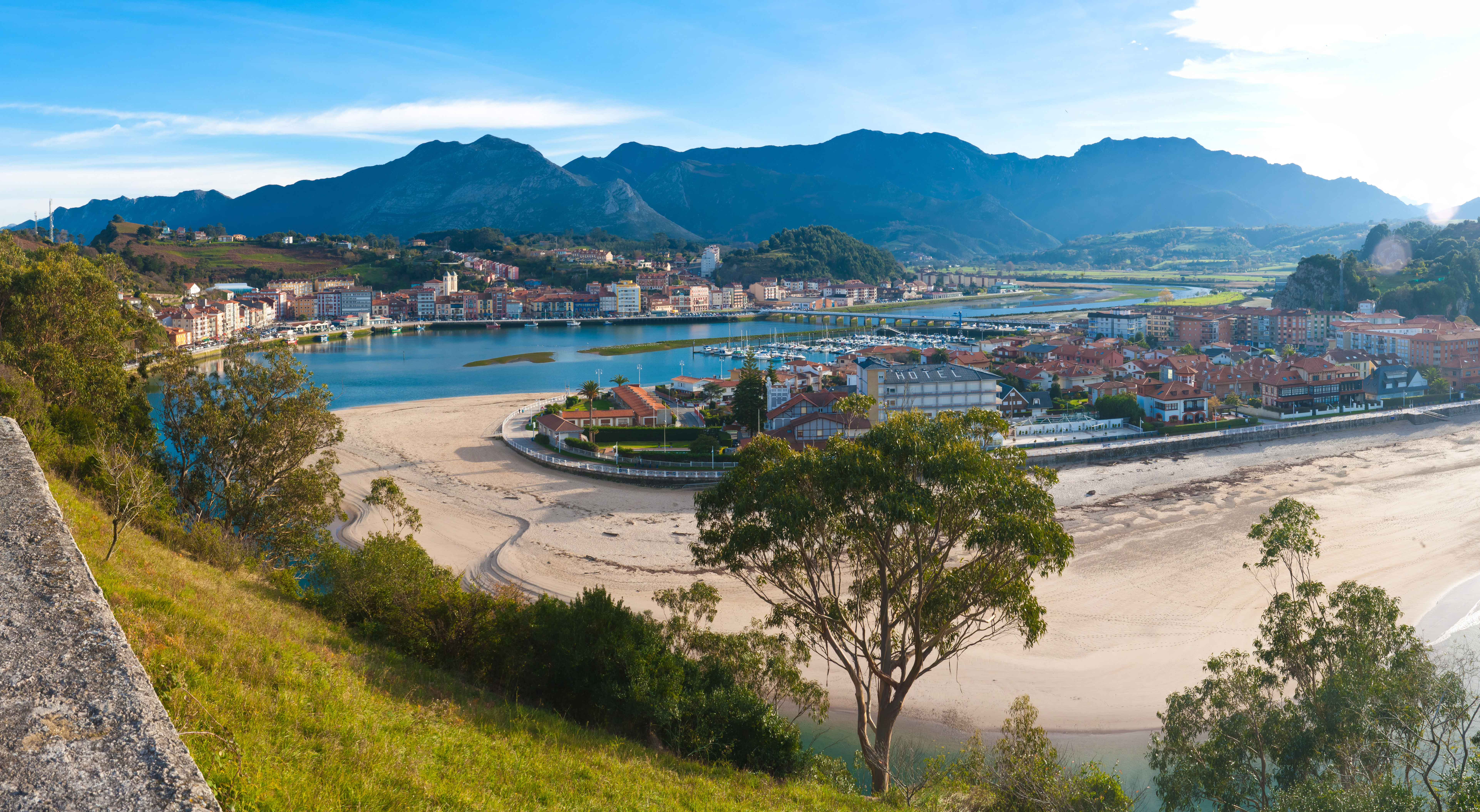 Conjunto Histórico de Ribadesella